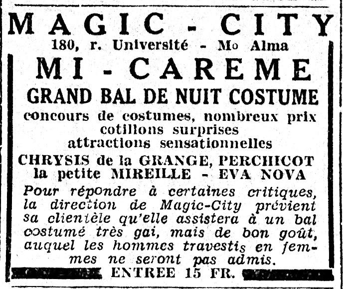 Annonce pour le bal de la Mi-Carême jeudi 29 mars 1935 à Magic-City. Il est précisé que les travestis n'y seront pas admis.